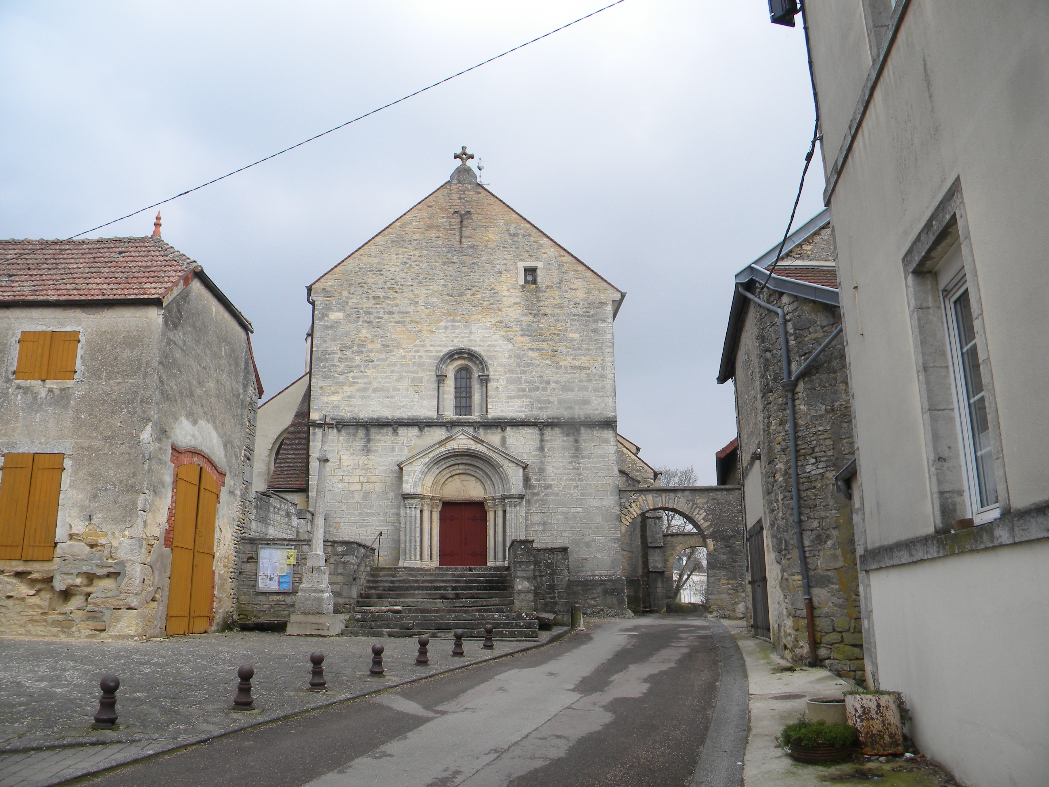 Eglise de l'Assomption